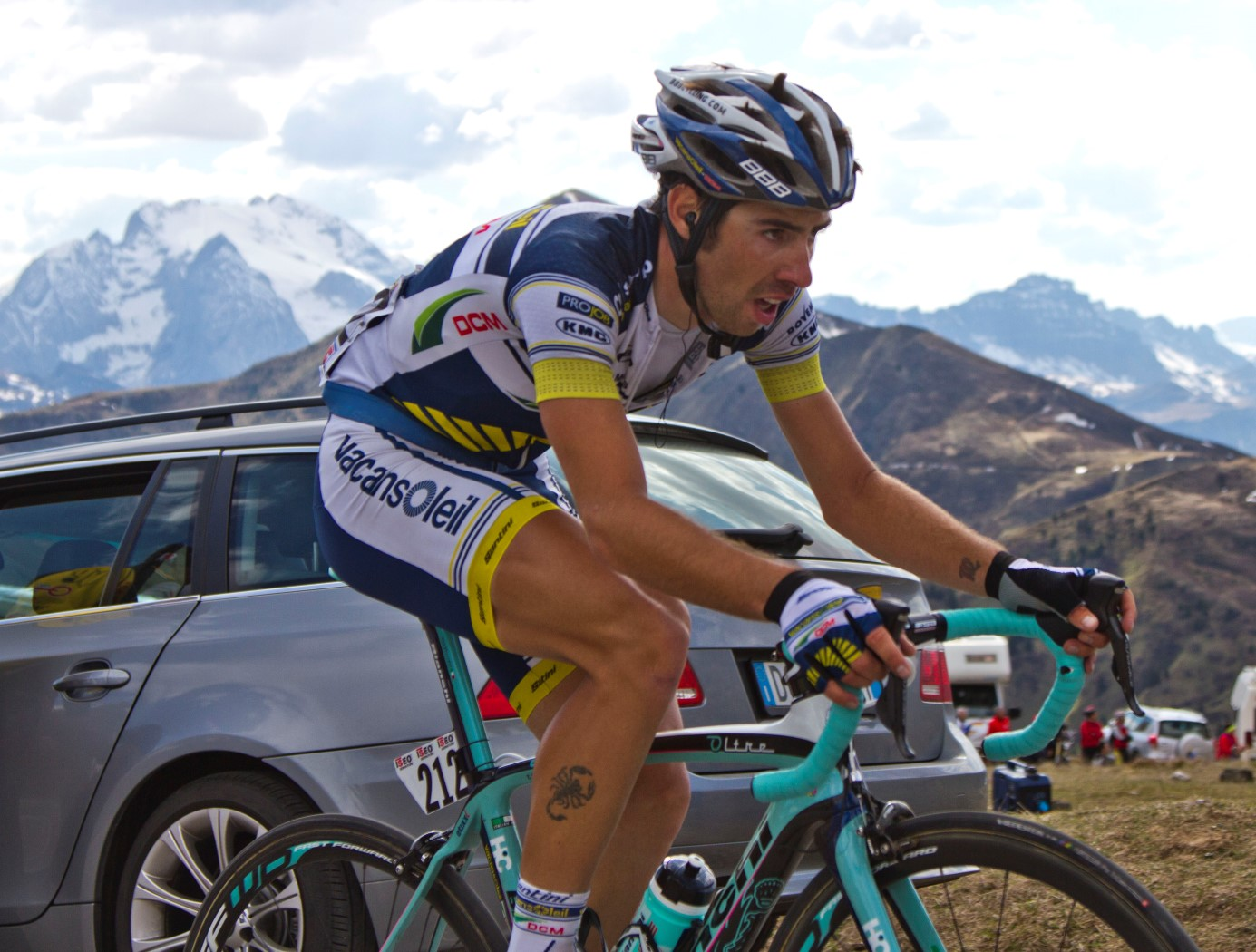 giau 153 de gendt